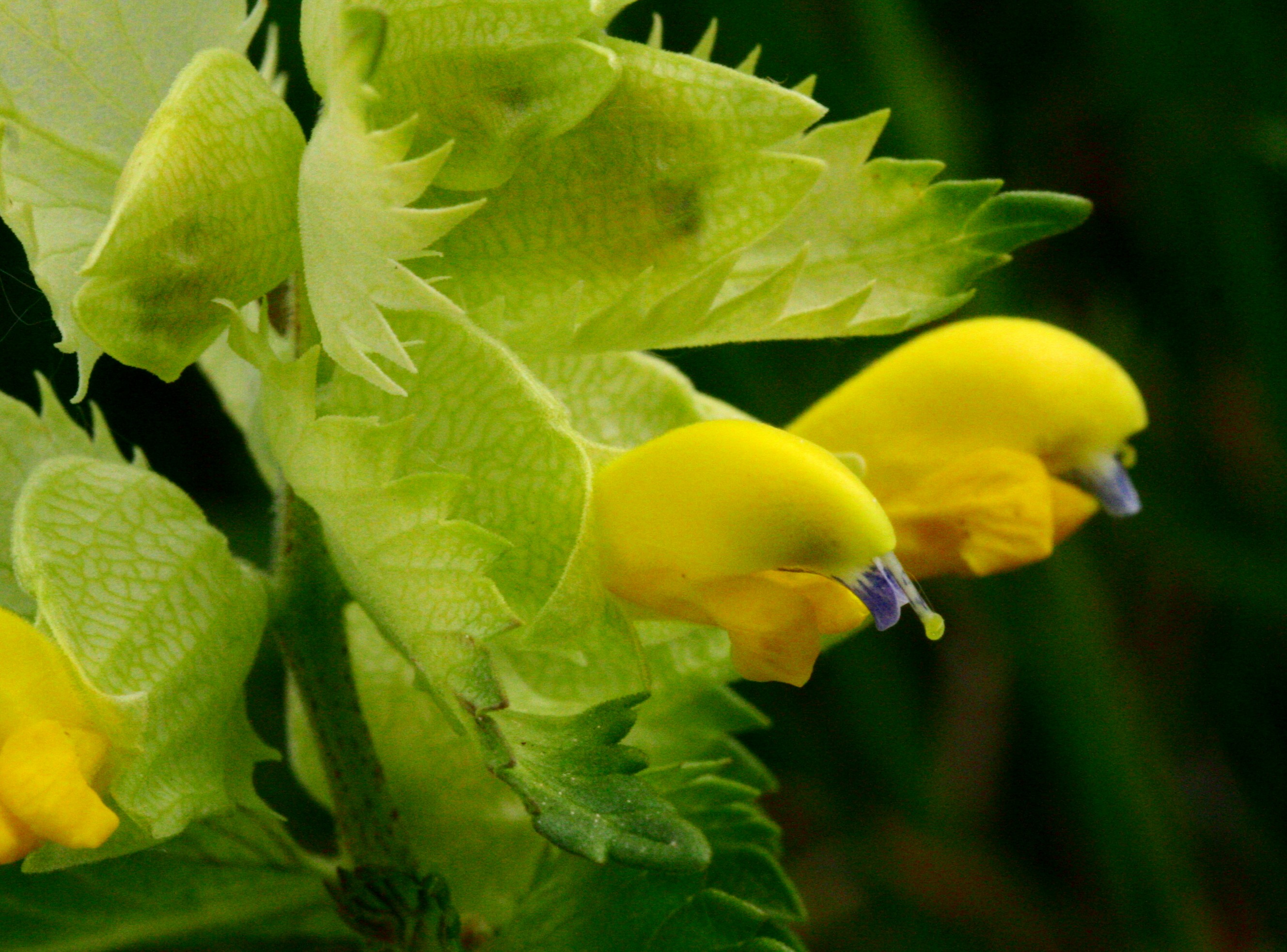 Rhinanthus_alectorolophus (Cresta di gallo comune) Località: Colderù, Lentiai (BL), 462 m s.l.m.